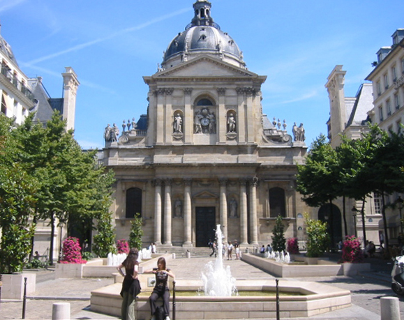 Université Sorbonne de Paris vu depuis la place de la Sorbonne